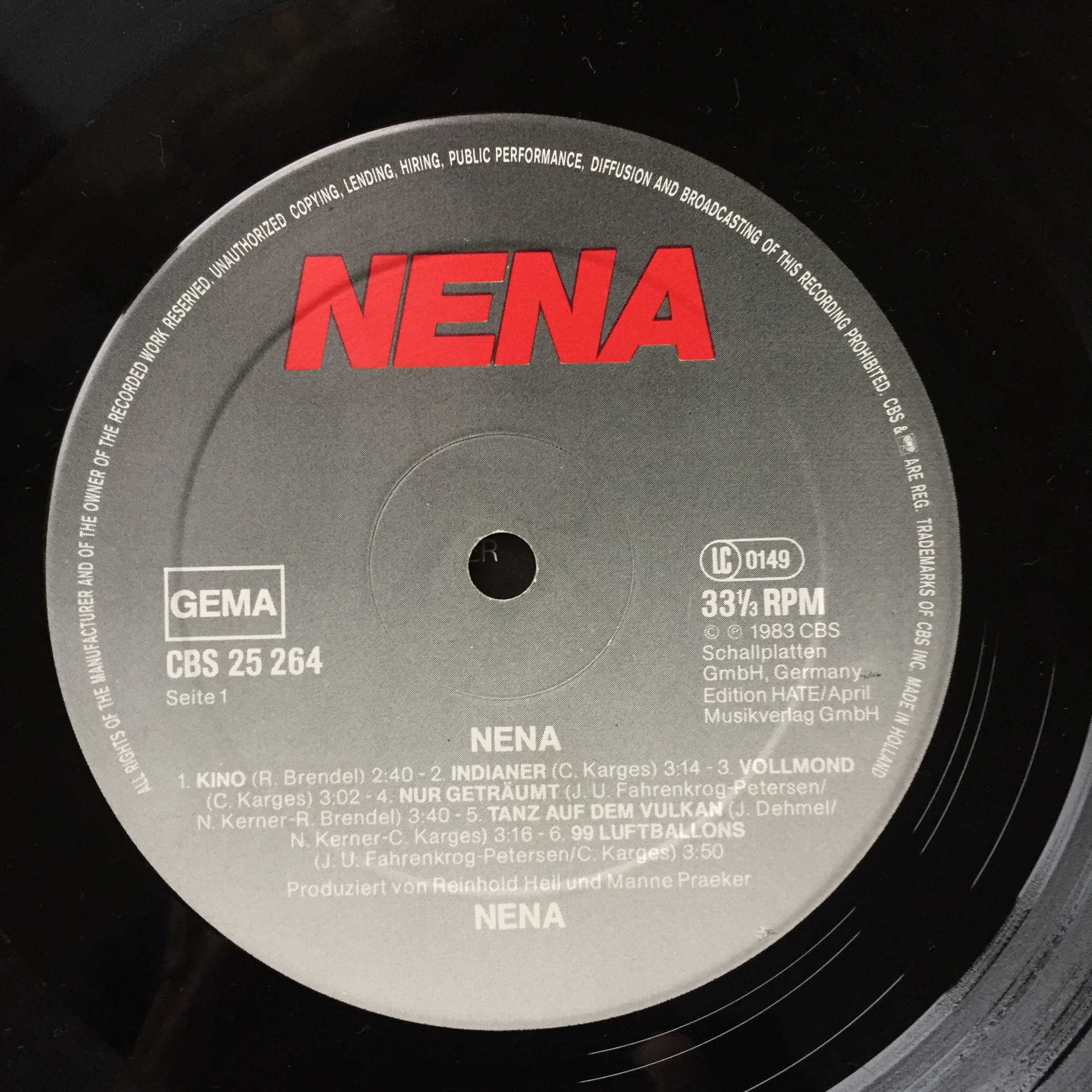 Label des ersten Nena-Albums